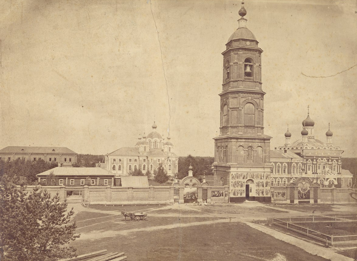 Выксунский Иверский монастырь (XIX век)